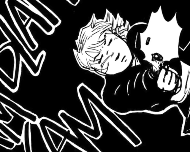 Bild ur kortfilmen "Eva - Asbesthjärtan", baserad på Tinet Elmgrens tecknade serie.